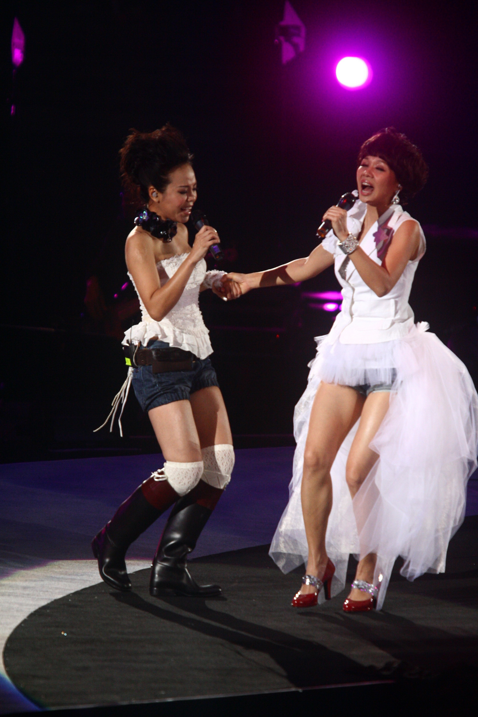 錦繡二重唱出席滾石唱片30周年演唱會。